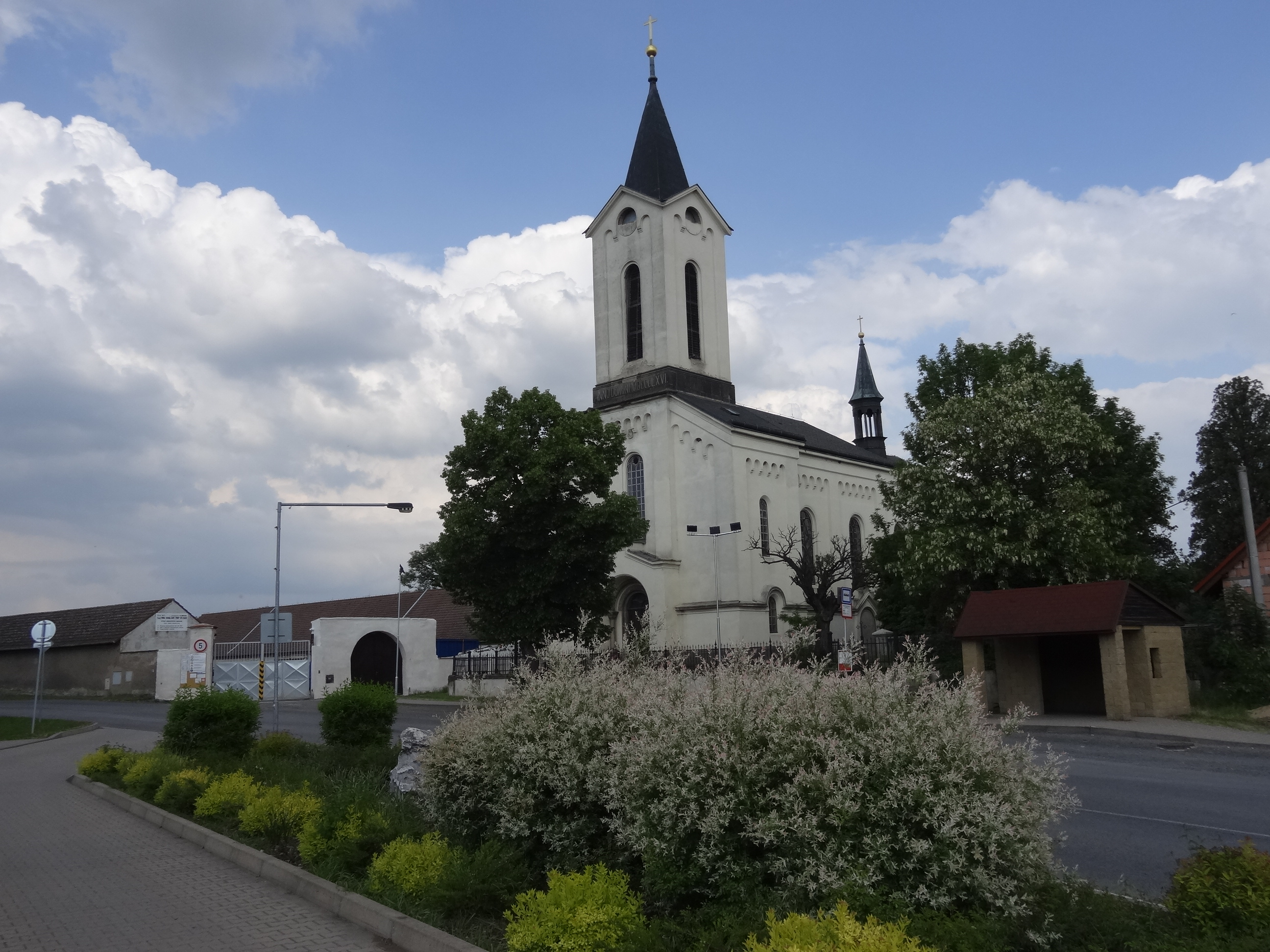 Kostel Stětí svatého Jana Křtitele, náves, Vliněves.